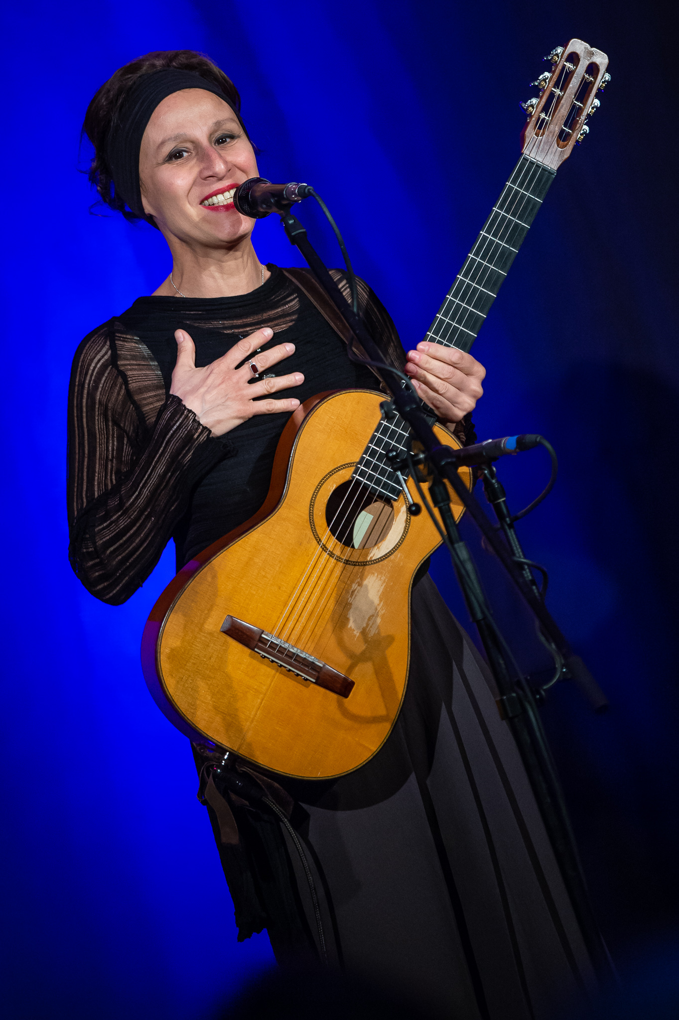 Concertbüro Franken,Etta Scollo,Gutmann am Dutzendteich,Konzert,Livekonzert,Livemusik